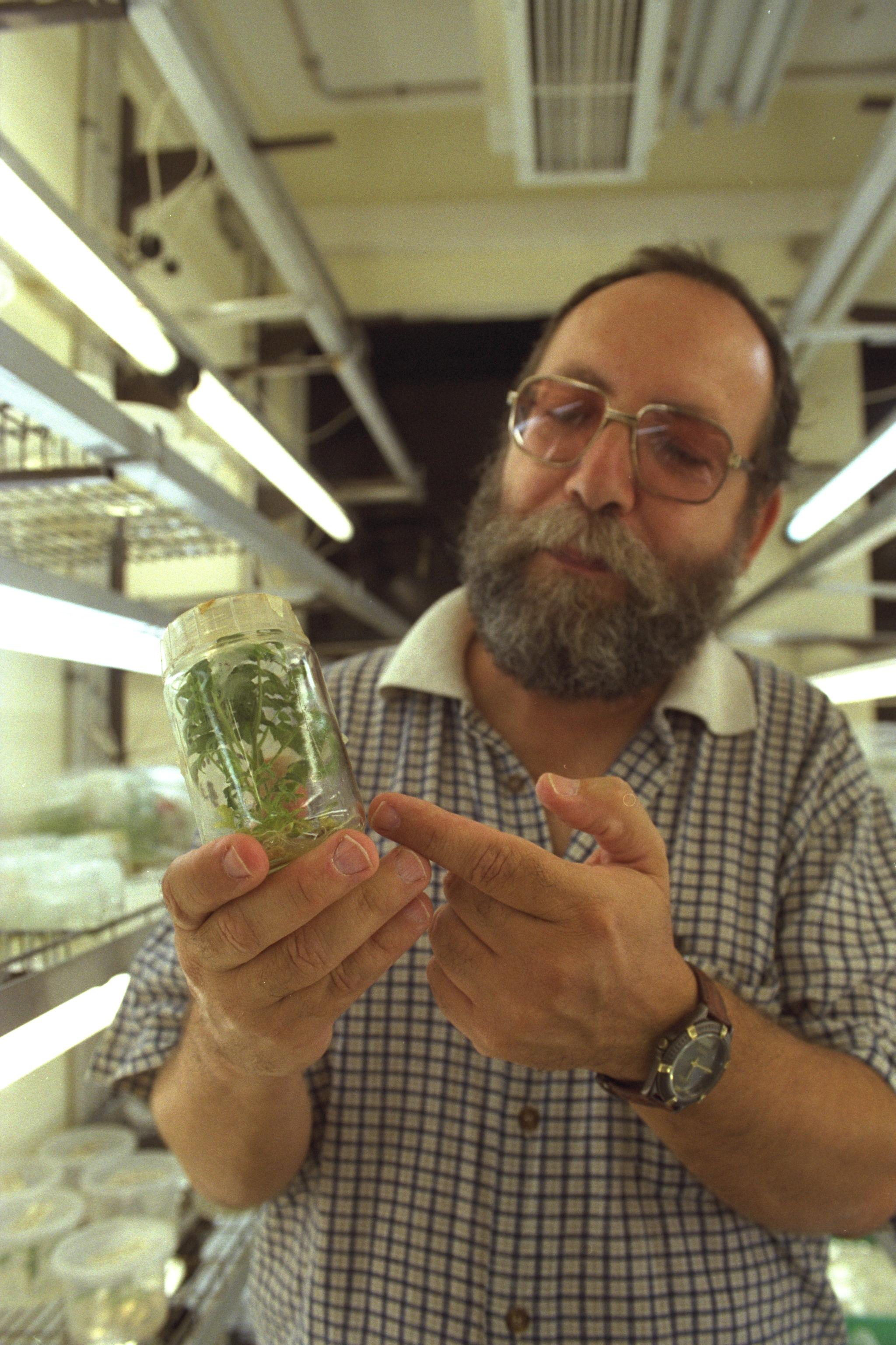 Prof. Yedidya Gafni, a botanist and researcher of genetically engineered plants, in the Volcani Institute lab. פרופ' יהודה גפני, בוטנאי וחוקר של הנדסה גנטית בצמחים במכון הוולקני